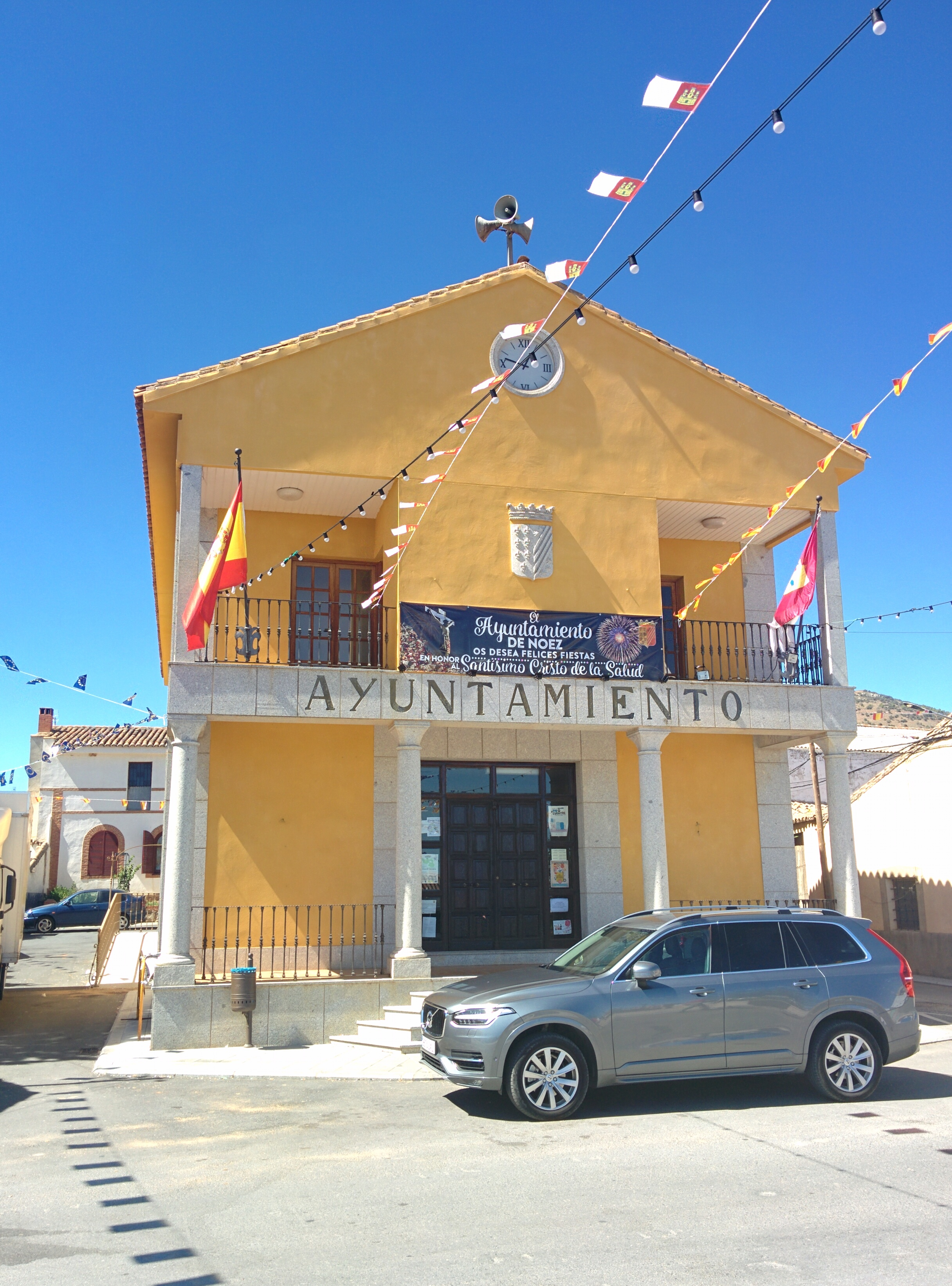 Casa consistorial de Noez (Toledo, España).